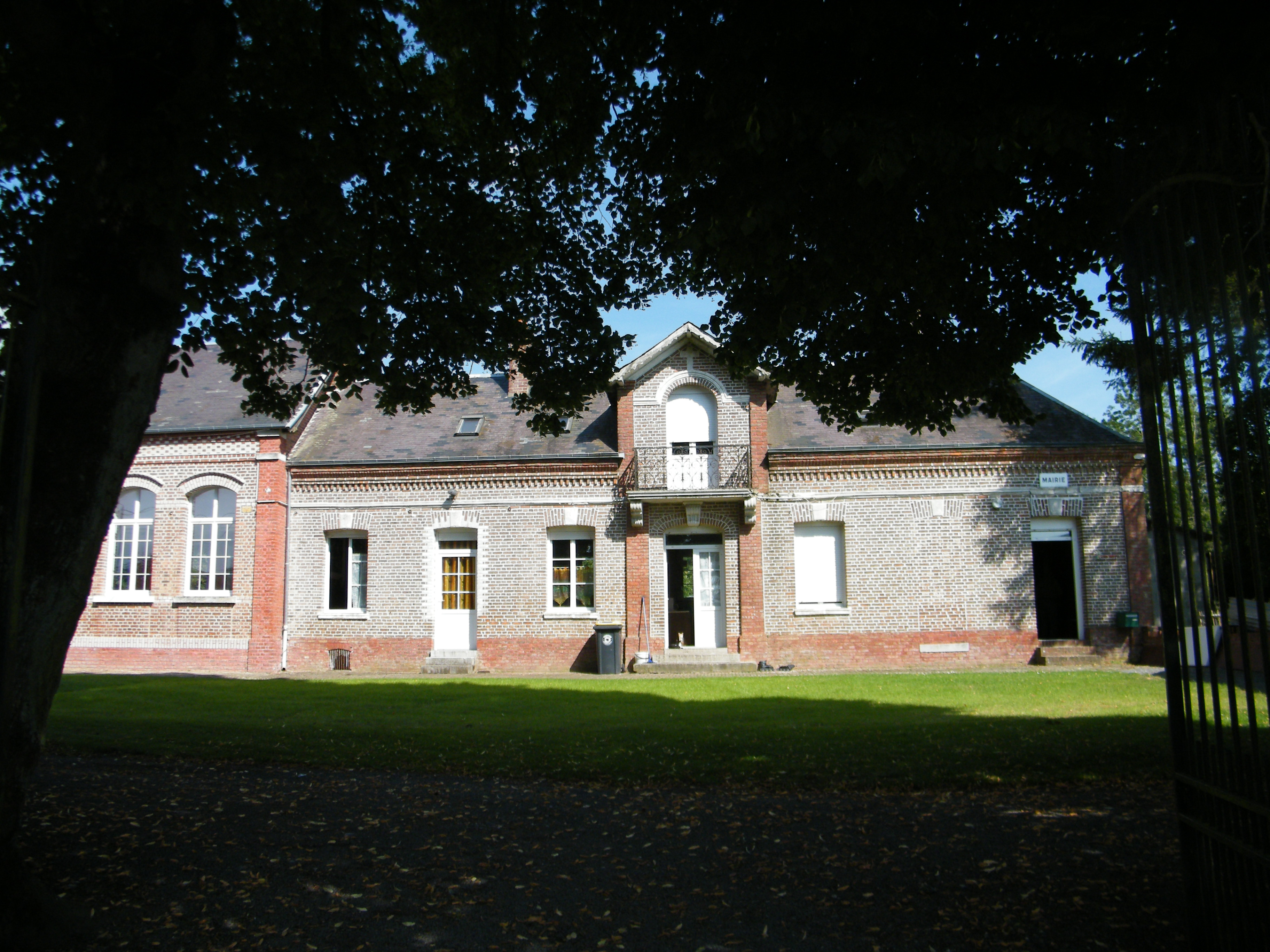 Mairie-école de Bettembos, Somme, France.